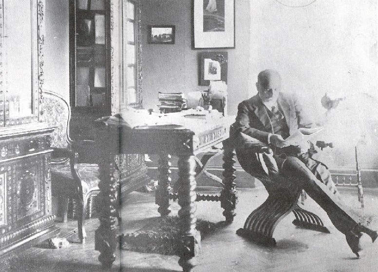 Pirandello nel suo studio di via Pietralata.